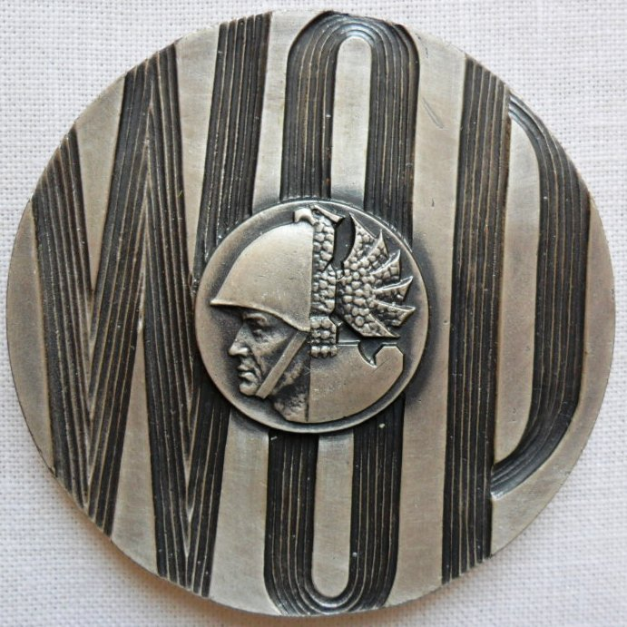 Medal pamiątkowy